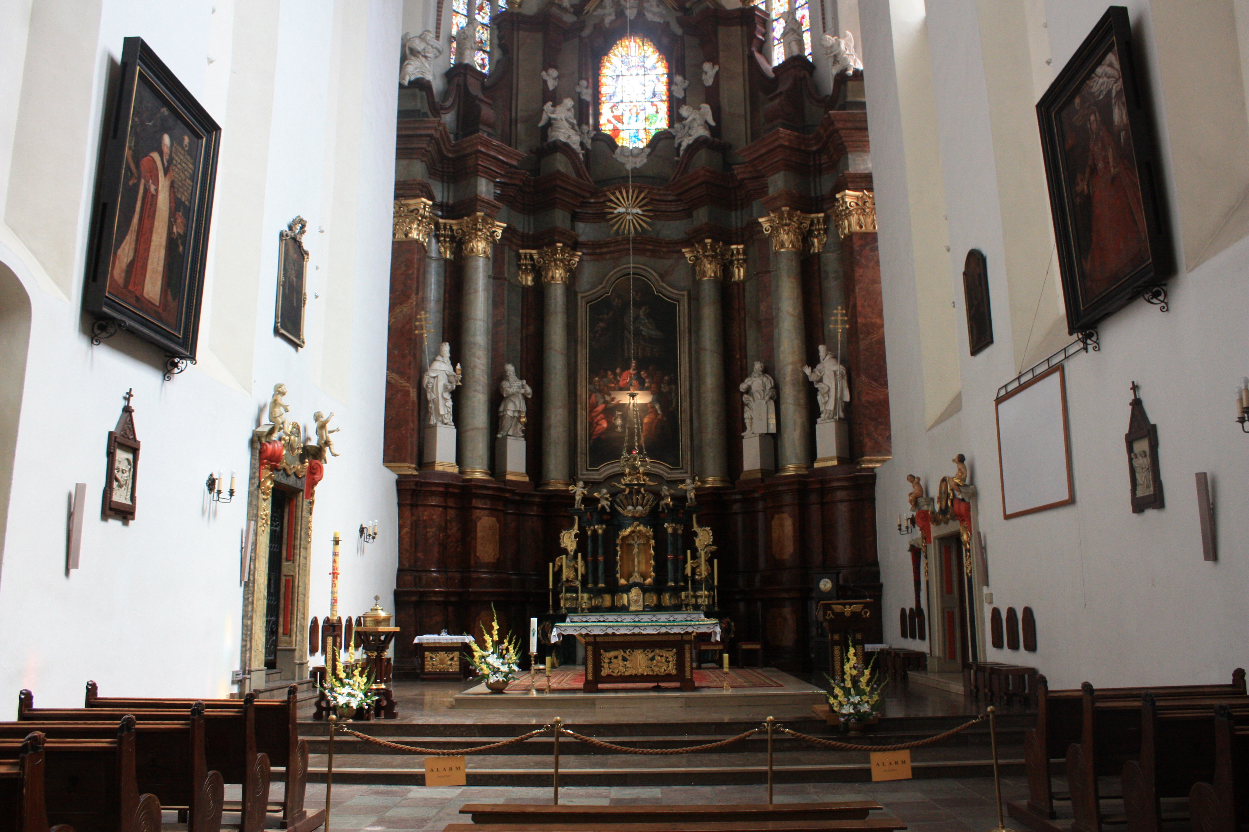 Kościół Bożego Ciała w Poznaniu. Ołtarz główny.